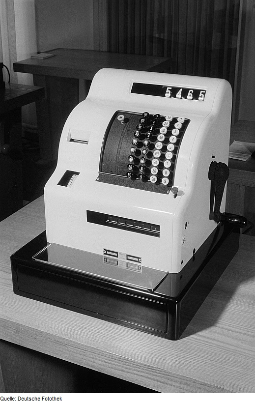 Original image description from the Deutsche Fotothek Weltausstellung für Buchgewerbe und Graphik 1954